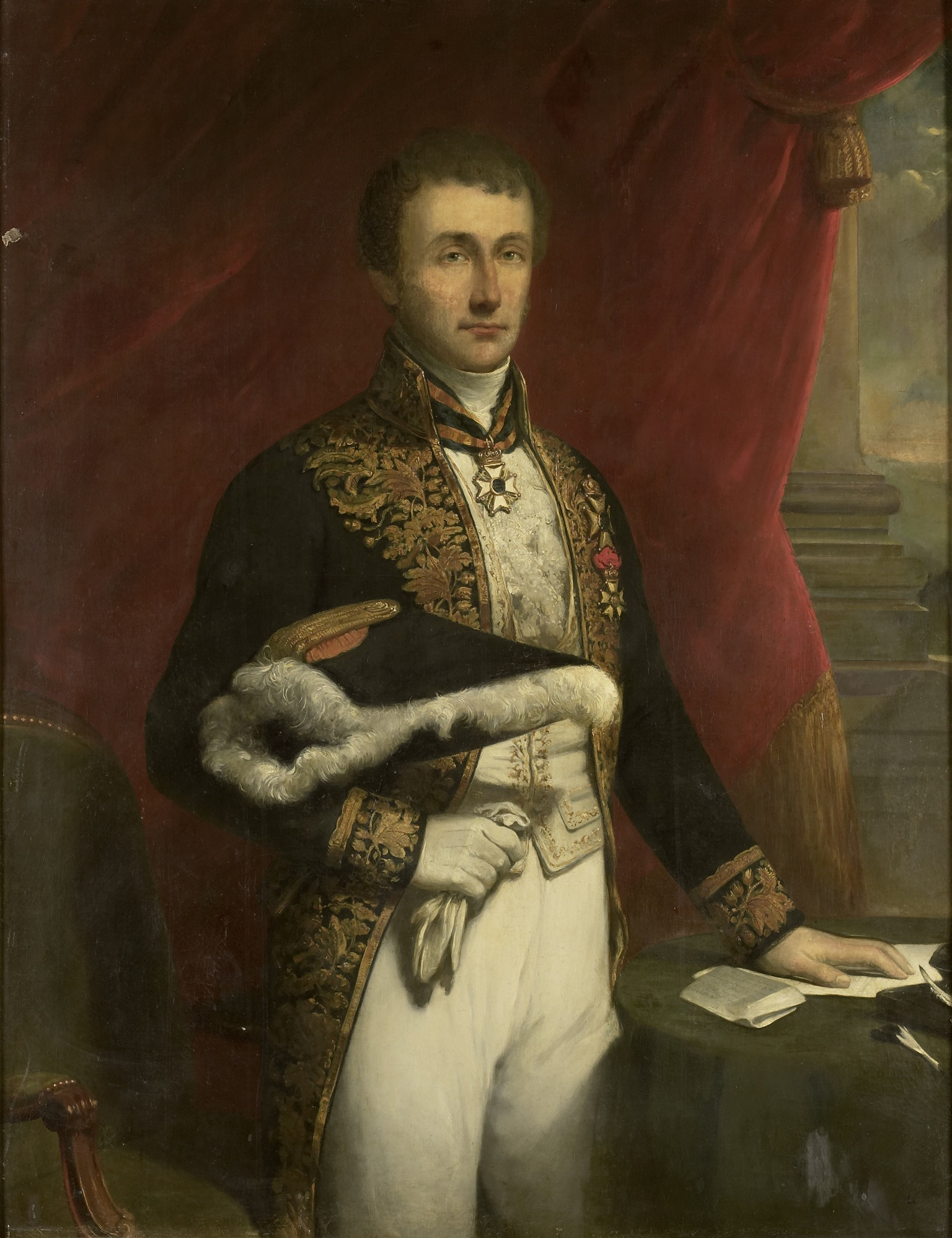 Portret van Pieter Merkus (1787-1844). Gouverneur-generaal (1841-44). Kniestuk, staande met de linkerhand rustend op een tafel waarop brieven en een inktstel liggen. Handschoenen in de rechterhand, de steek onder de rechterarm geklemd. Onderdeel van een reeks van portretten van de gouverneurs-generaal van het voormalige Nederlands Oost-Indië. Collection: schilderijen; Gouverneurs-generaal serie